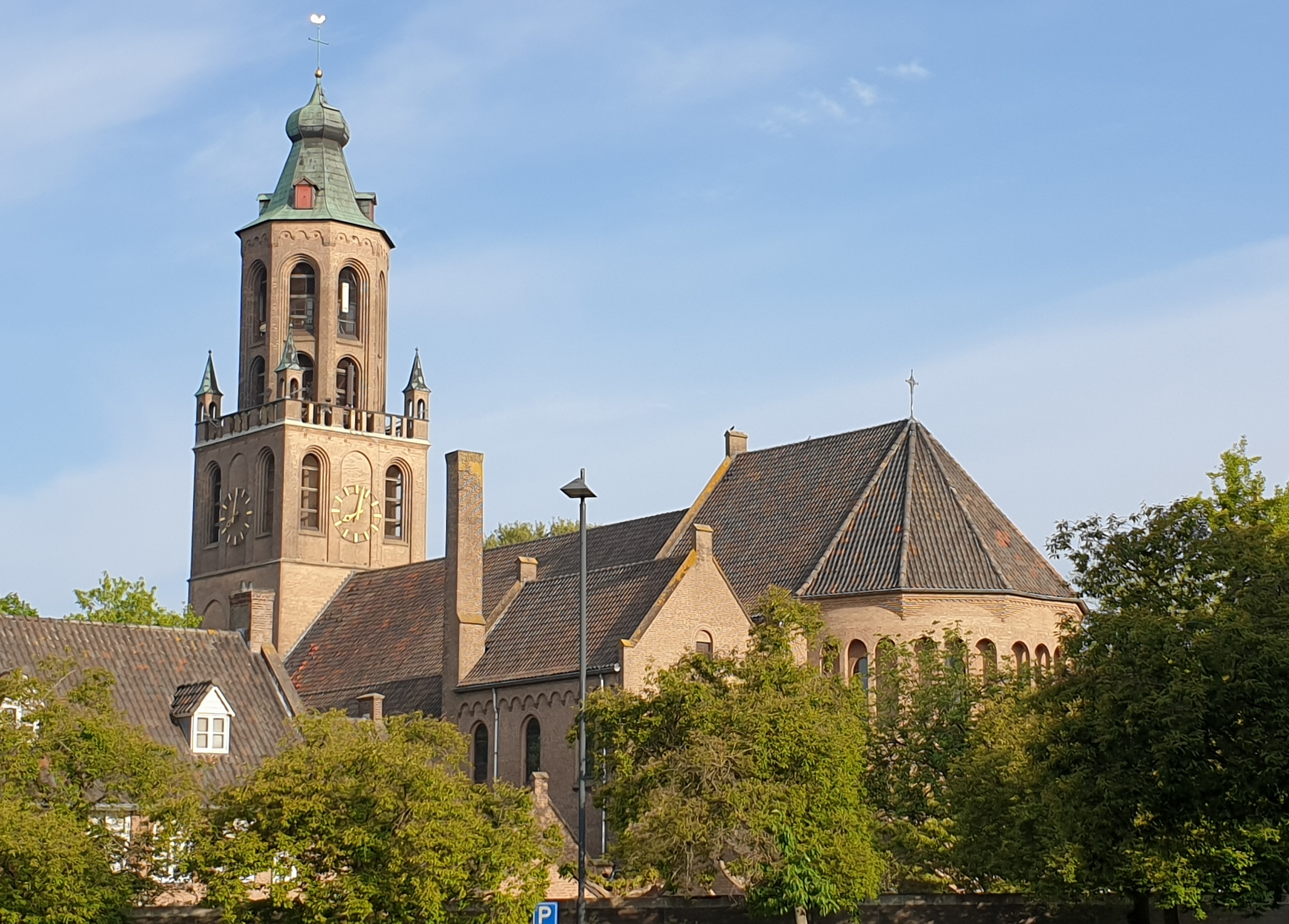 De OLV ten Hemelopneming vanaf het Raadhuisplein